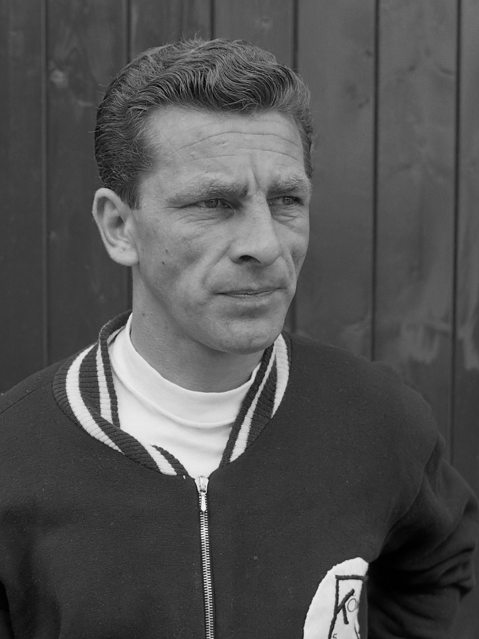 Volewijckers - Holland Sport. Clavan van Holland Sport 30 augustus 1964